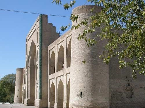 Бухара. Медресе Мулло Турсунжон